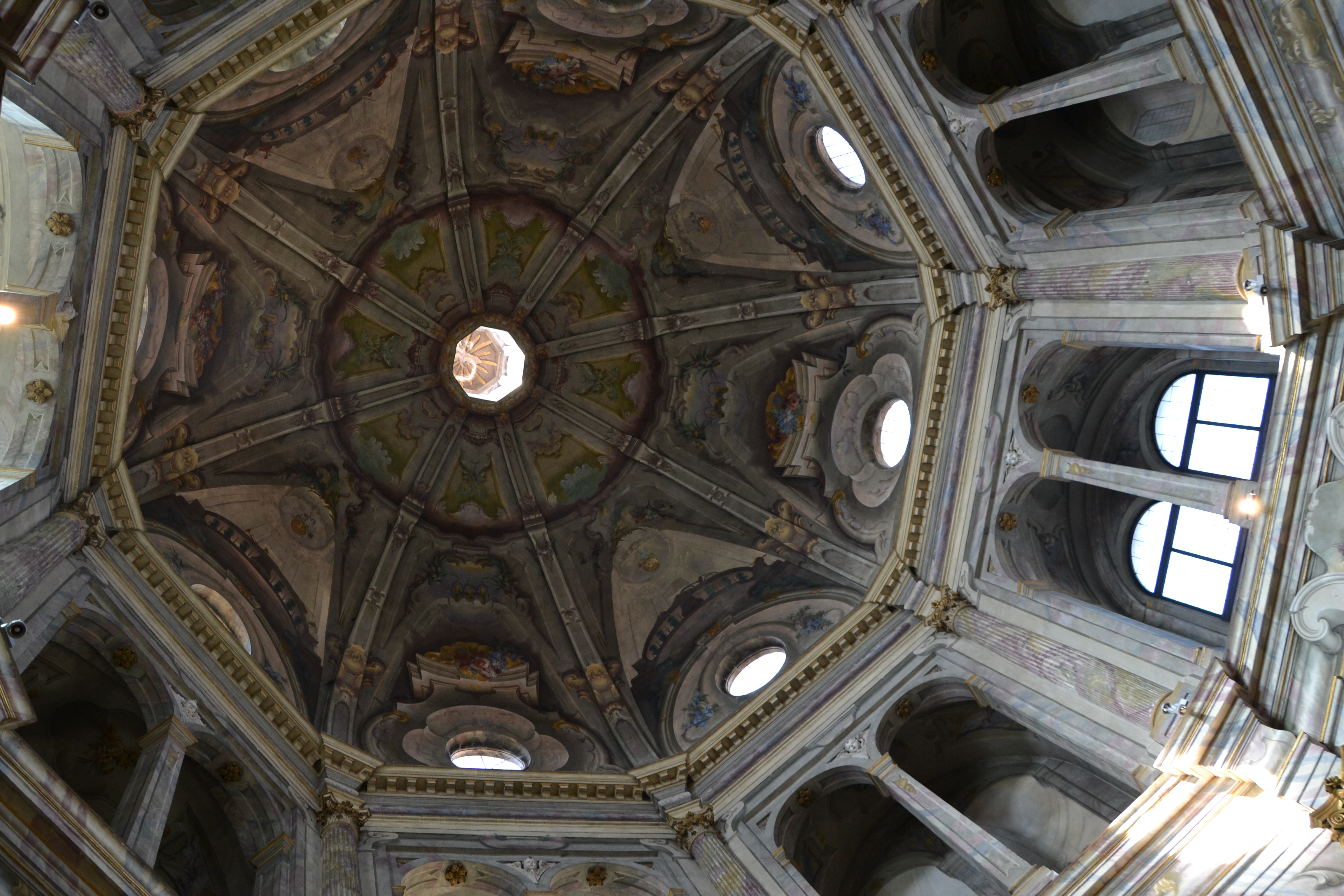 Santa Maria di Canepanova (Pavia) (1492 - sec. XVII)